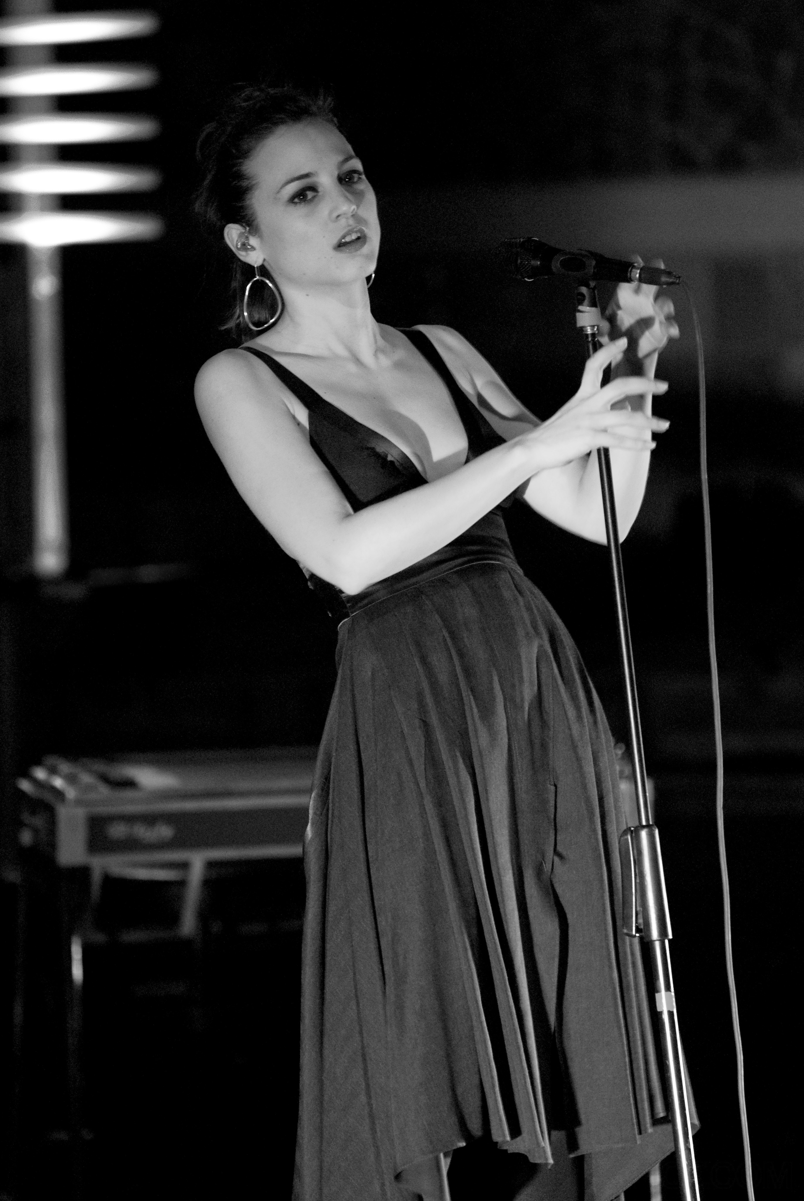 Marlango